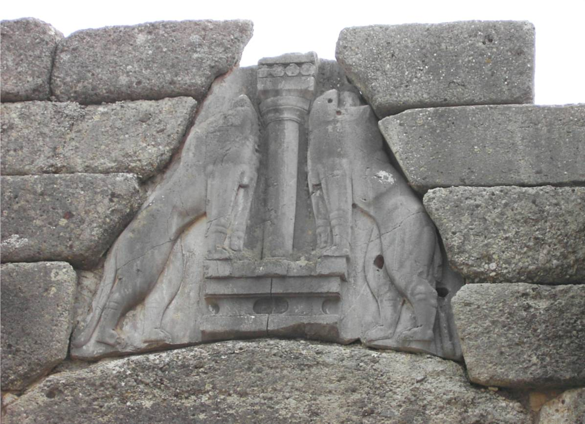 Eigen foto Sofie Debognies april 2005